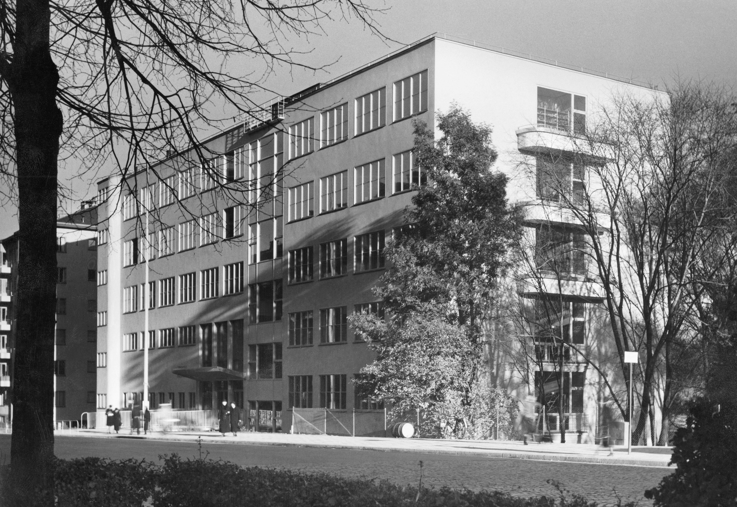 Lyceum för flickor (Östermalmsskolan)